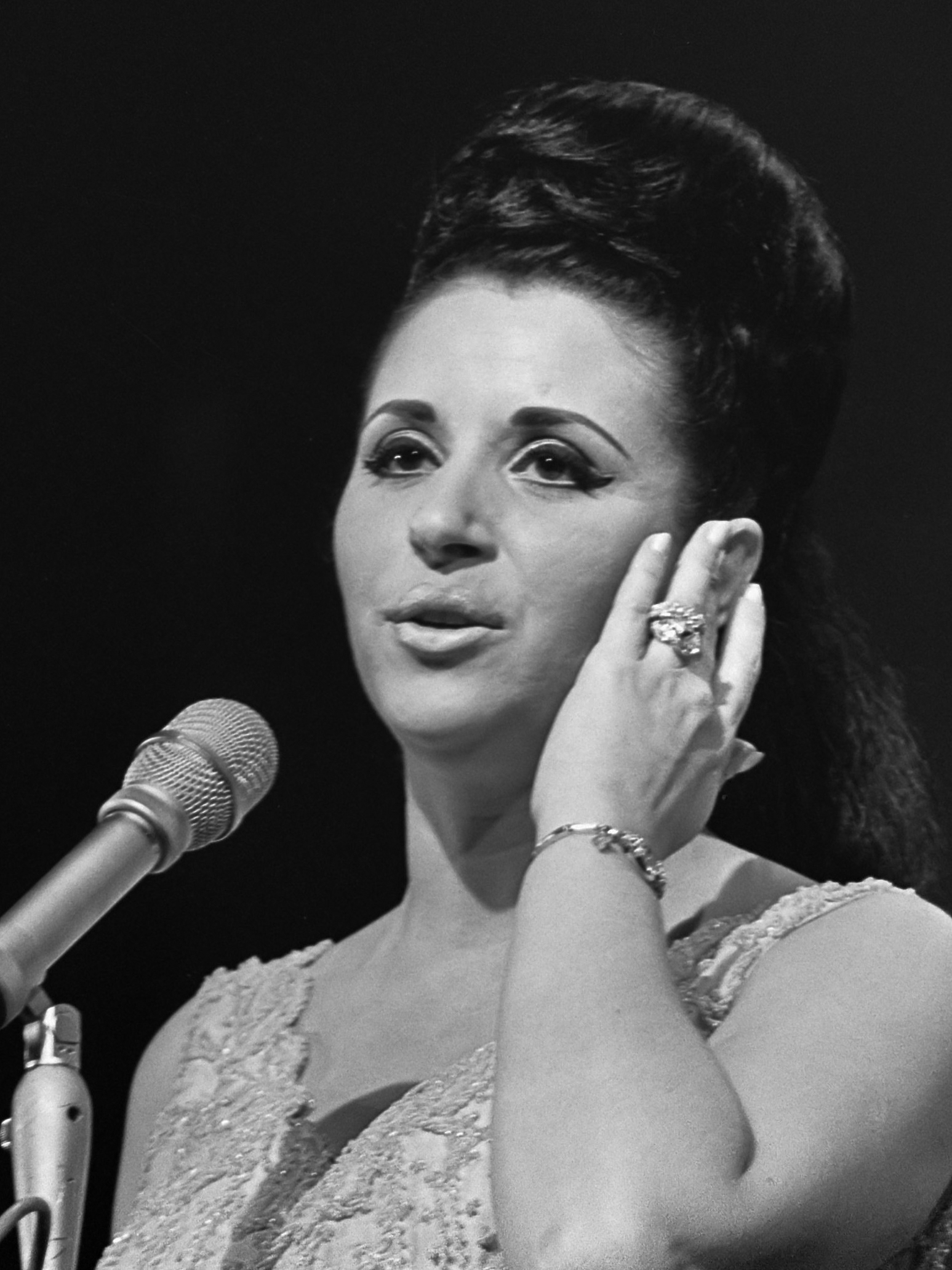 Grand Gala du Disque 1965 , Lucille Starr 2 oktober 1965